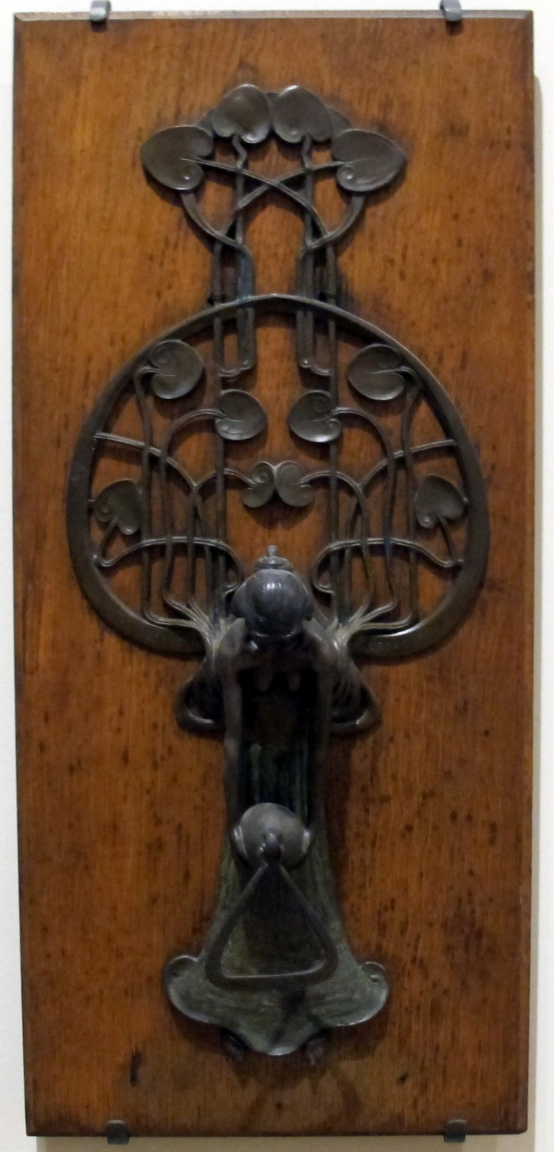 Petit Palais, Parigi